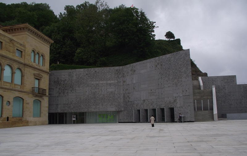 Skeudenn o tiskouez mirdi San Telmo e Donostia, ar gouent gozh hag ar savadur arnevez bet savet evit gallout kreskiñ ar mirdi.